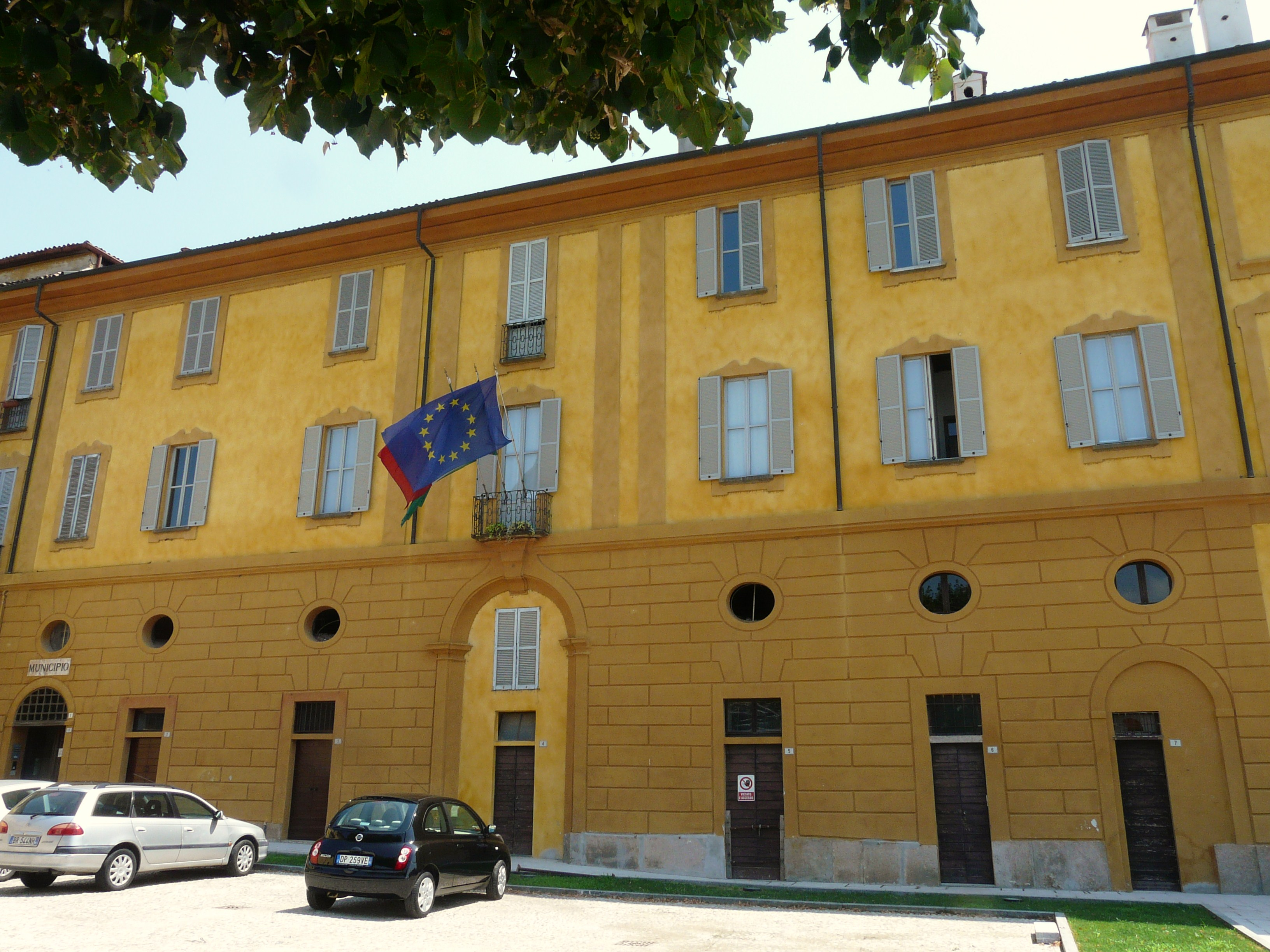 Municipio di Morimondo, Lombardia, Italia